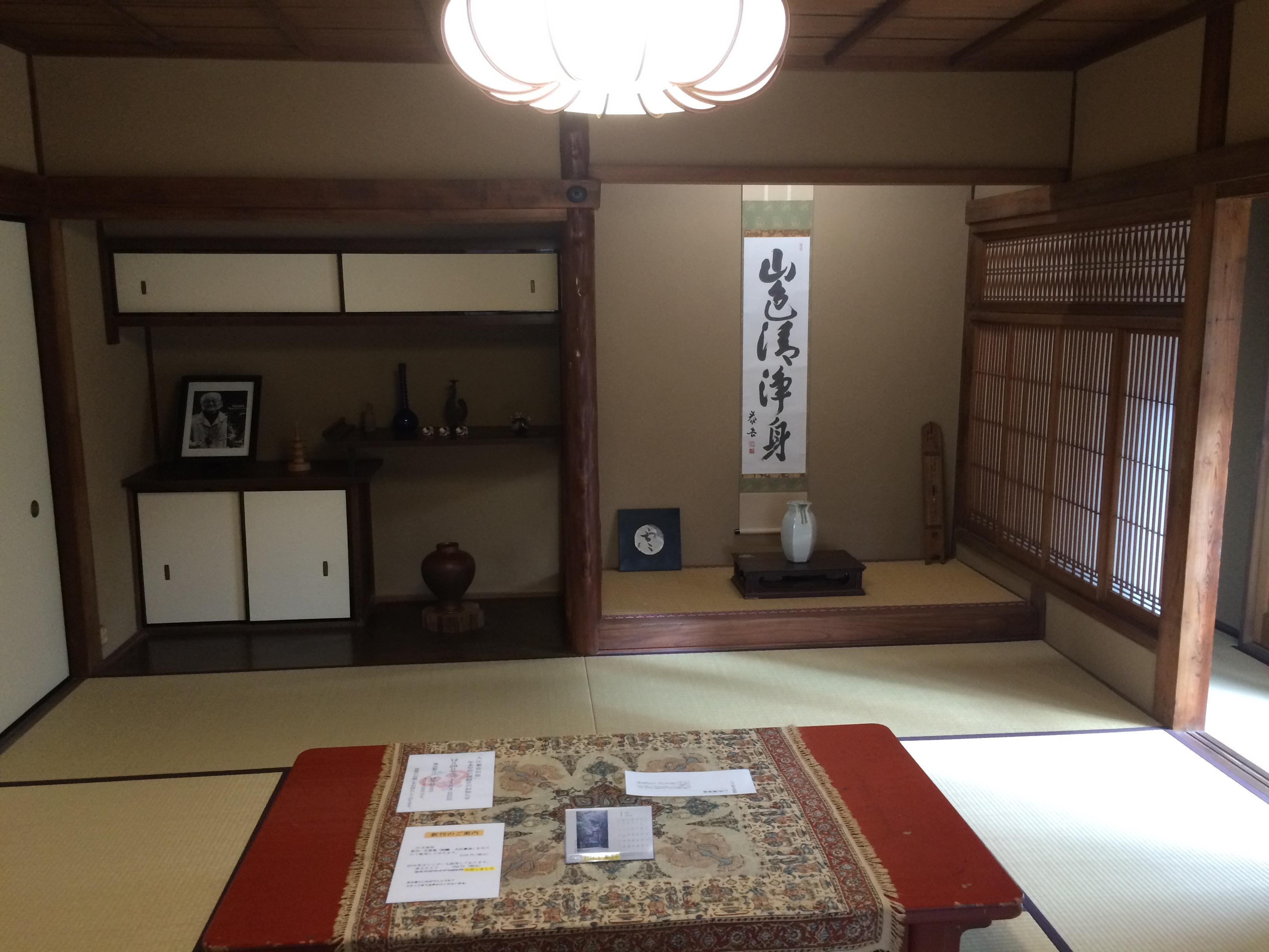 入江泰吉旧居客間